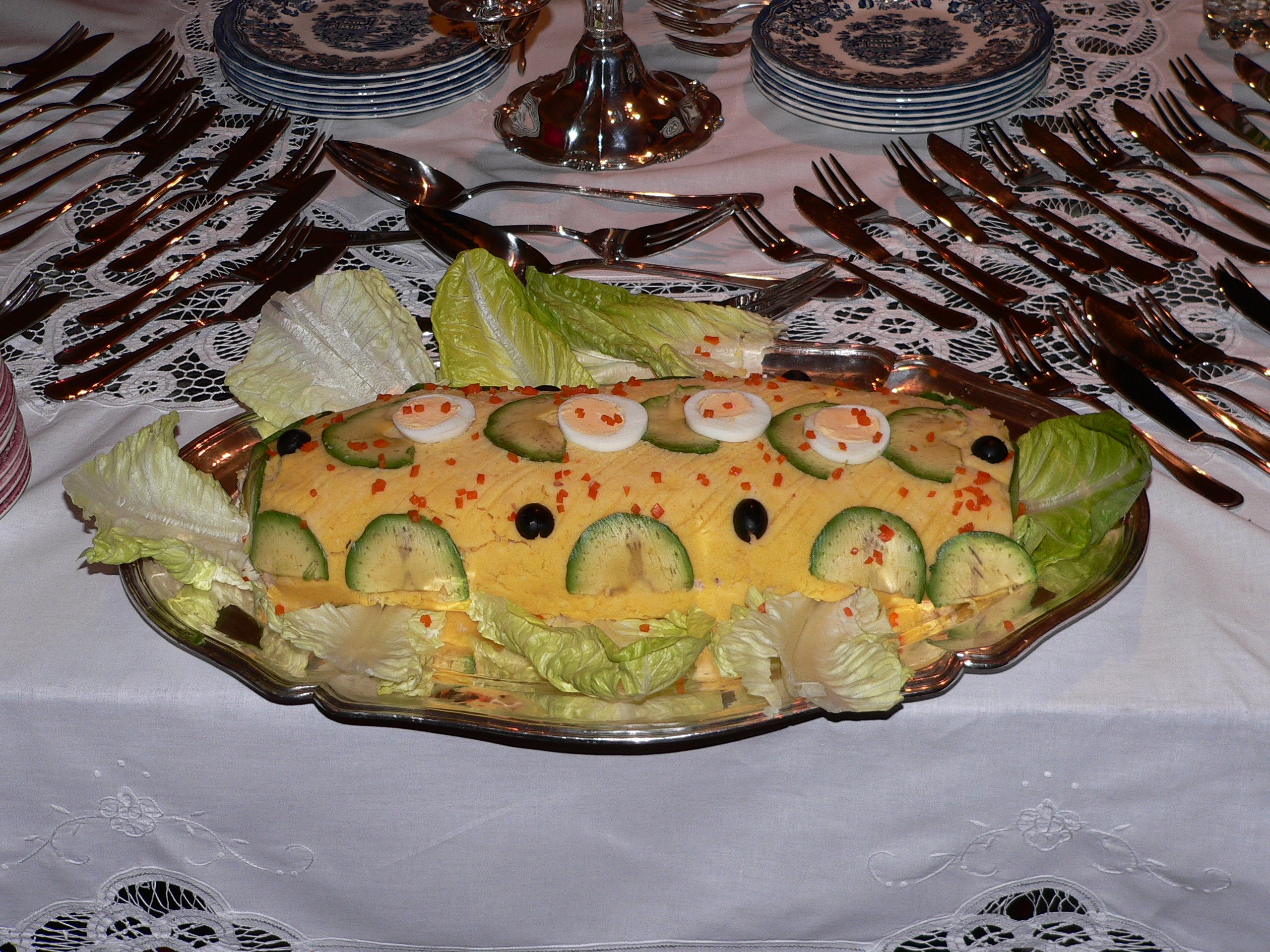 Description: Peruvian cuisine Name: Causa limeña (causa a la limeña) Country : Peru Photographer: © Manuel González Olaechea y Franco Shot date : February, 10th , 2007